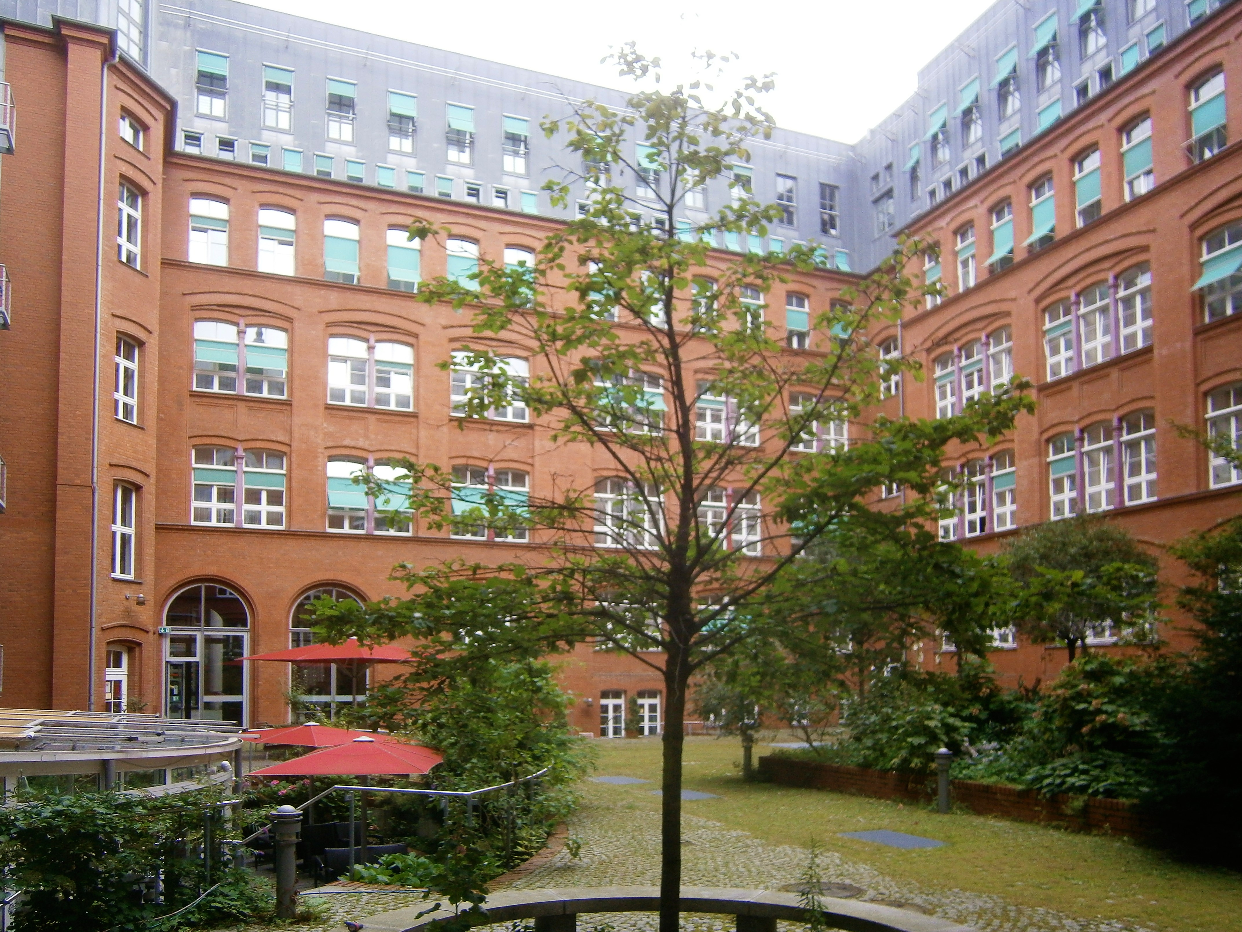 Die Andreasstraße ist eine Straße im Berliner Bezirk Friedrichshain-Kreuzberg, Ortsteil Friedrichshain. Angelegt wurde sie 1862 auf vorherigen Gartenland und 1863 benannt. Bis um 1900 waren die Grundstücke bebaut und bis 1930 wurde verdichtet. Bei Luftangriffen im Zweiten Weltkrieg wurde die Gebäude schwer getroffen. So ist die Straße seit den 1950er Jahren mit wiederhergestellten Altbauten, aber besondres durch Plattenbau-Wohnblöcke aber seit 1990 auch durch Hotel- und Bürobauten im Umfeld des Ostbahnhofs charakterieisiert. Das Bild zeigt den Innenhof des vormaligen Schulhauses (Ostteil), das in den Hotelbau einbezogen wurde.